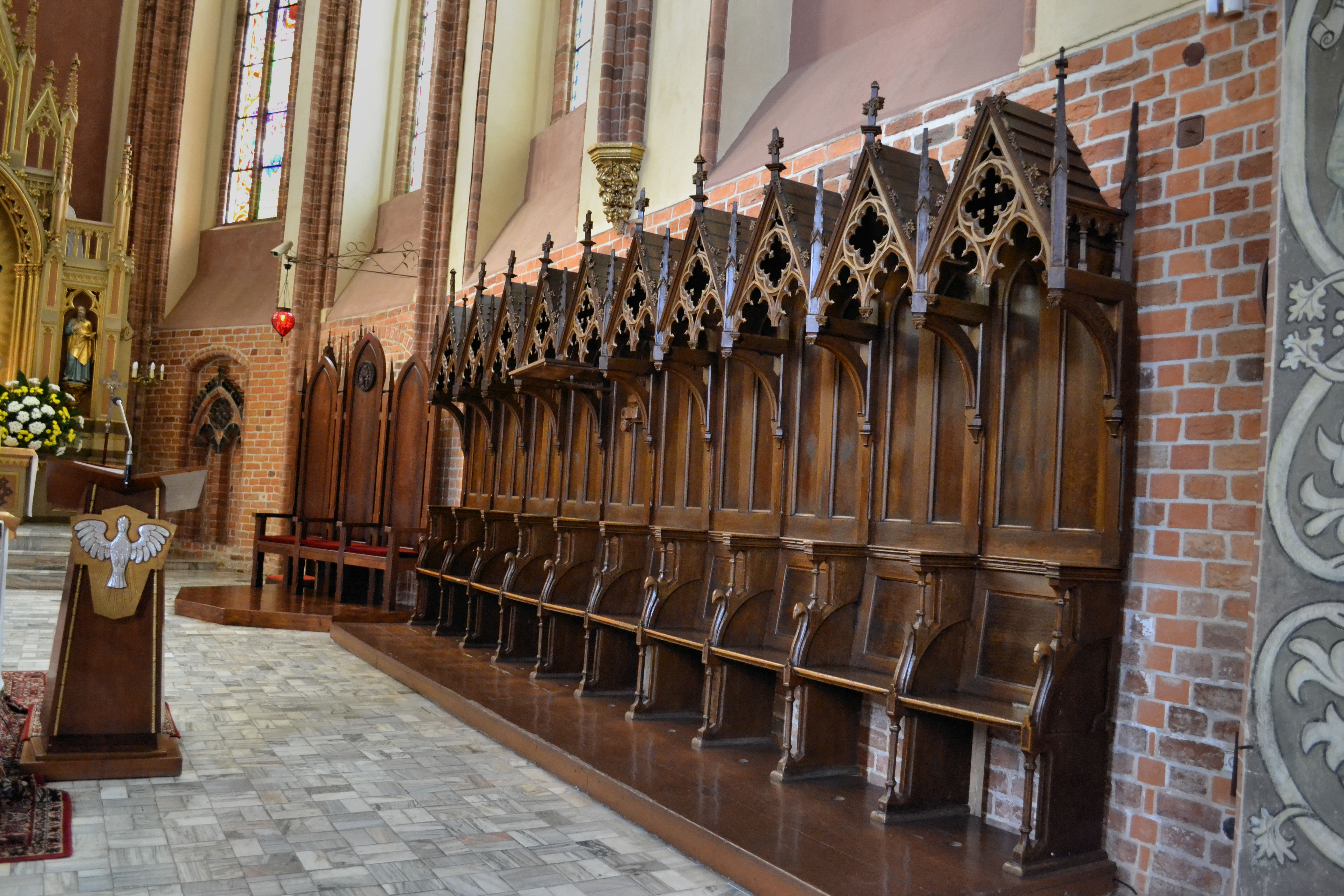 kościół Macierzyństwa NMP Trzebiatów